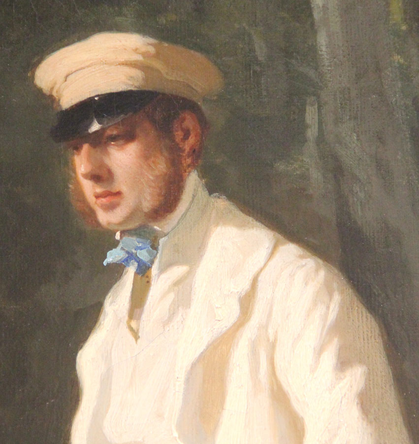 Der belgische Aristokrat Alfred Mosselman (1810-1867). Ausschnitt aus Alfred Dedreux, Portrait de Monsieur et Madame Mosselman et de leur deux filles, 1848)